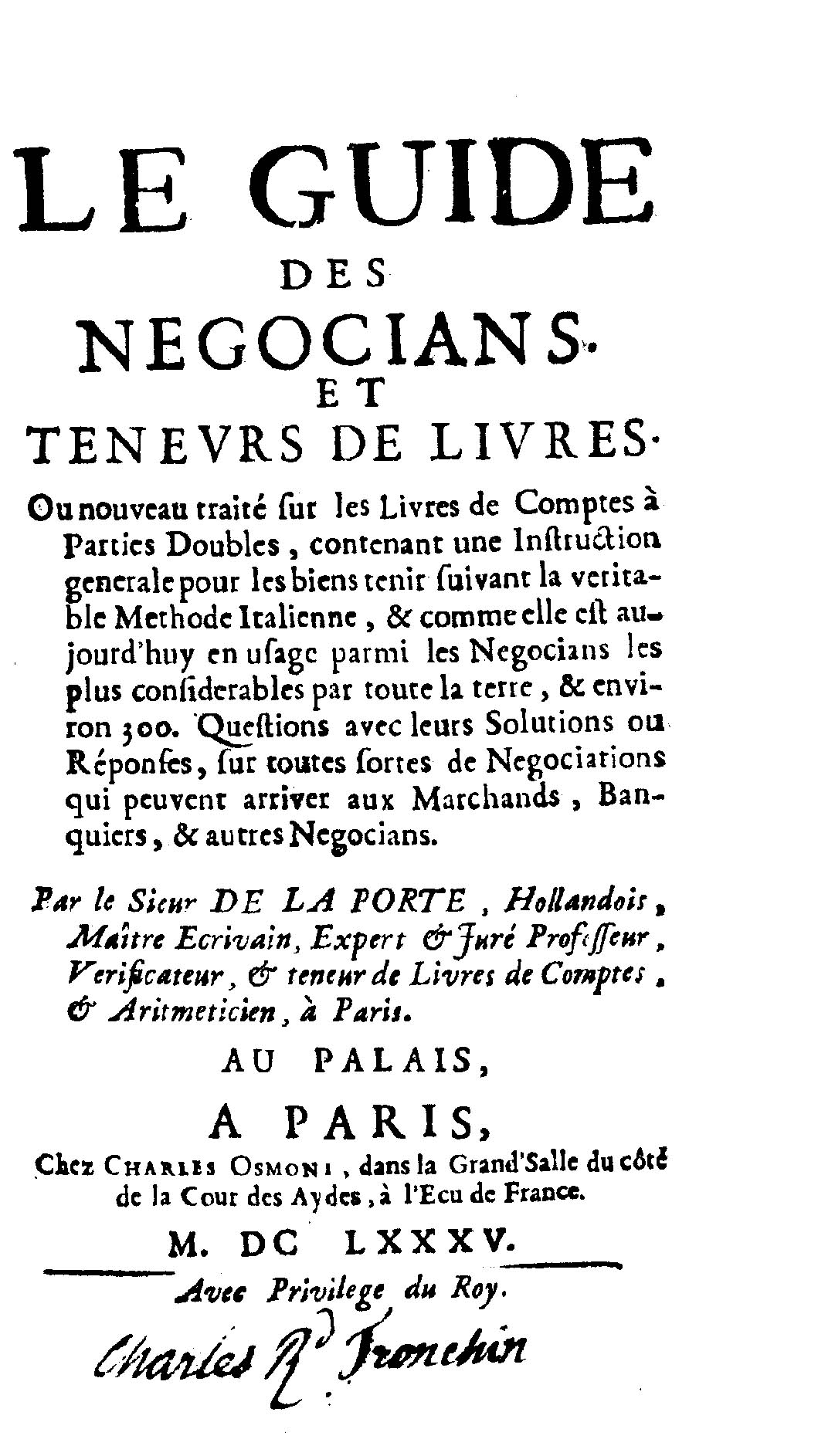 Le guide des negocians. Et teneurs de livres. Ou nouveau traité sur les livres de comptes à parties doubles, ... Par le sieur De la Porte …. - A Paris : chez Charles Osmont, dans la Grand'Salle du coté de la Cour des Aydes, à l'Ecu de France, 1685. - [20], 207, [1] p. ; 4º .